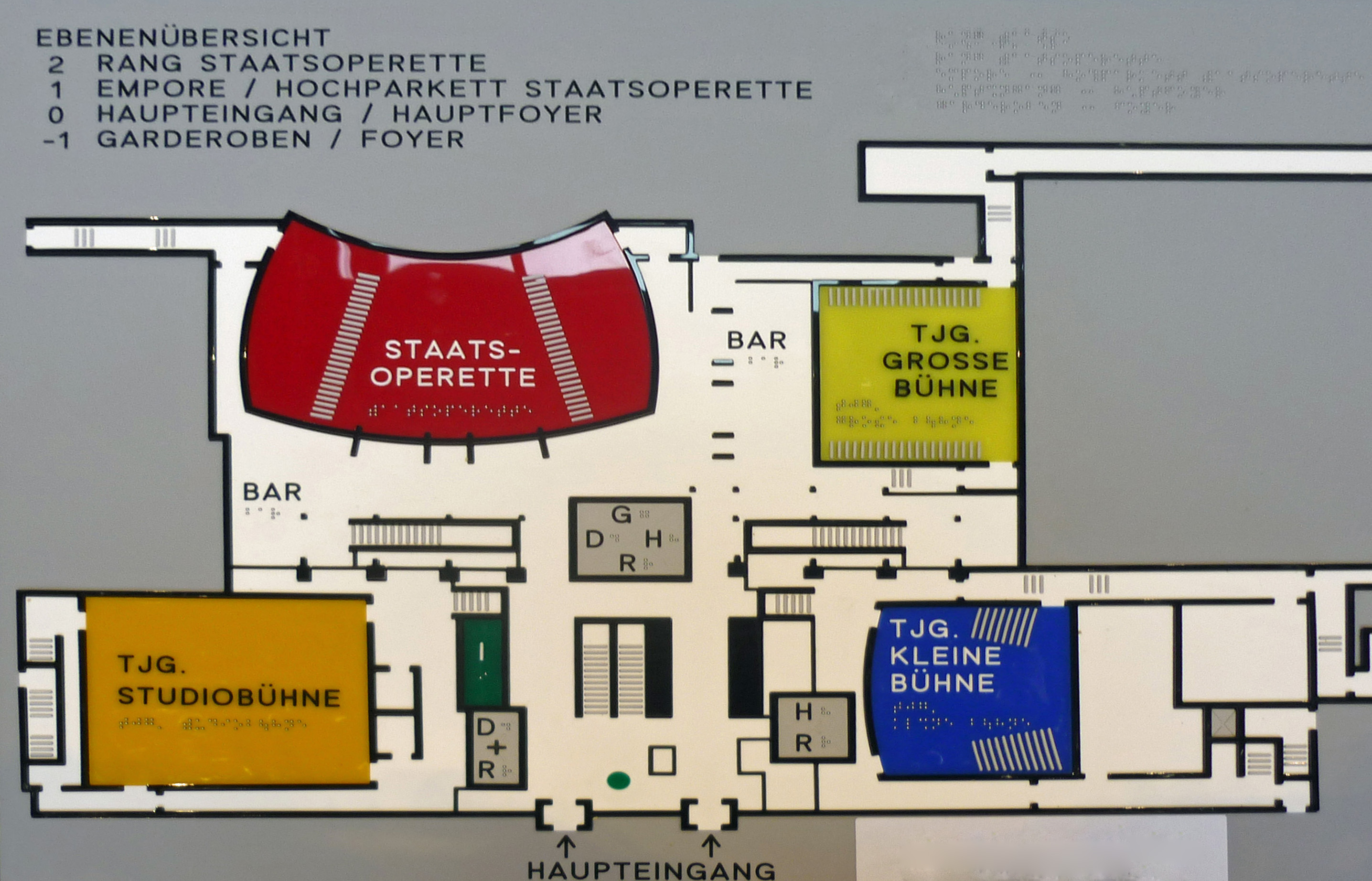 Kulturkraftwerk Dresden (ehemals Heizkraftwerk Dresden-Mitte): Anordnung der Spielstätten - Staatsoperette Dresden und Theater der jungen Generation